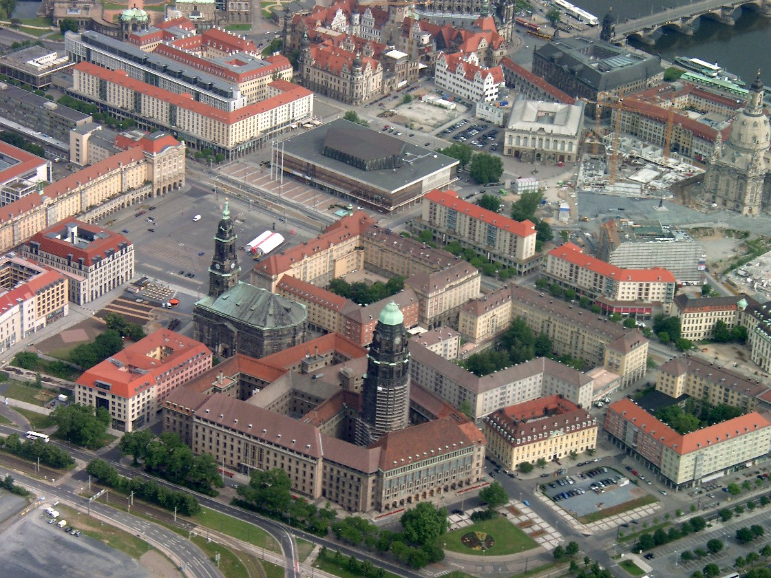 Luftbild der Umgebung des Dresdner Altmarktes